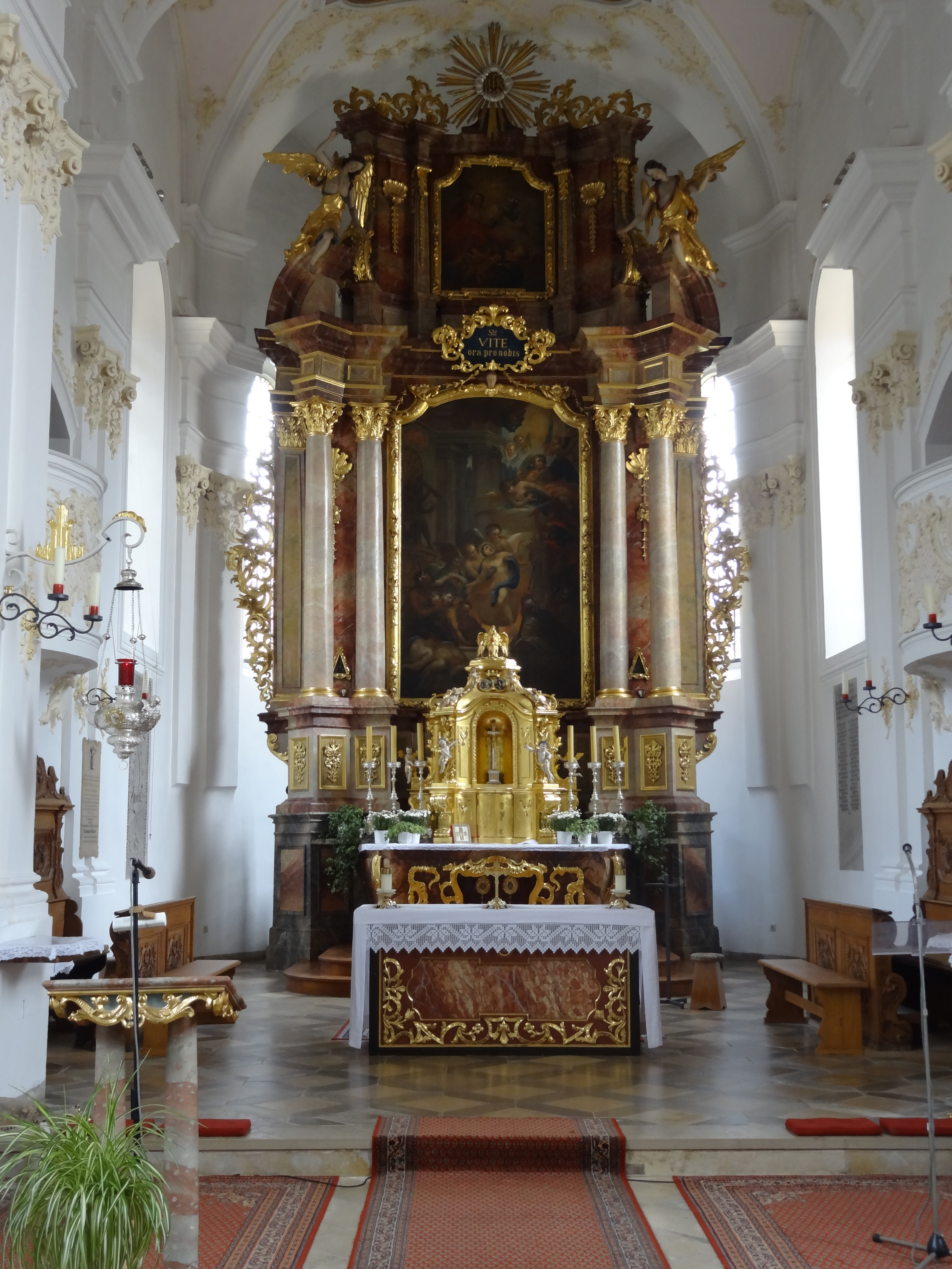 Chorraum der Pfarrkirche St. Vitus in Offenstetten (Stadt Abensberg, Landkreis Kelheim)